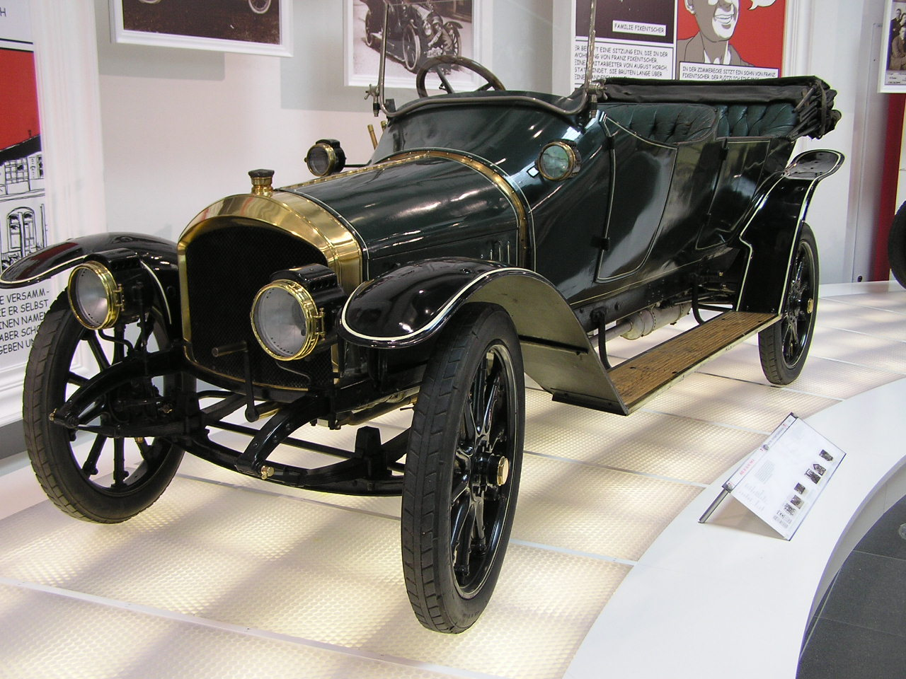 Audi Typ A